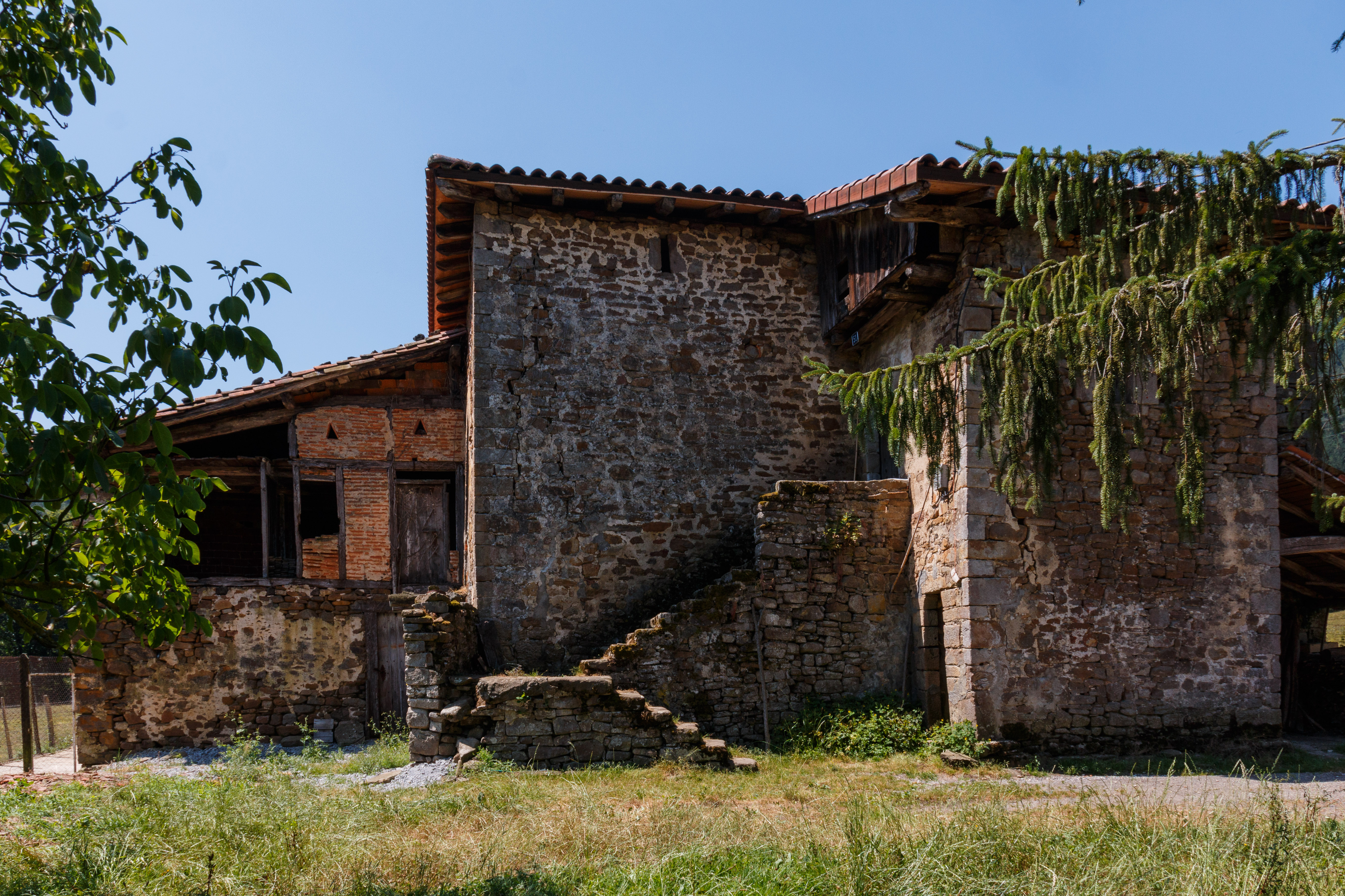 Caldalso dorrea